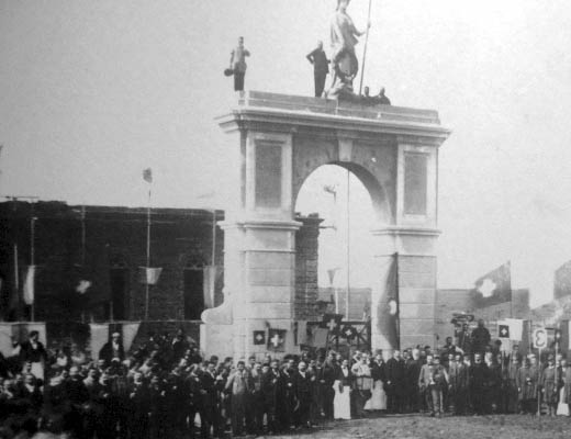 Inauguración del Arco del Triunfo que oficia de ingreso al club Tiro Suizo, a fines del siglo XIX.